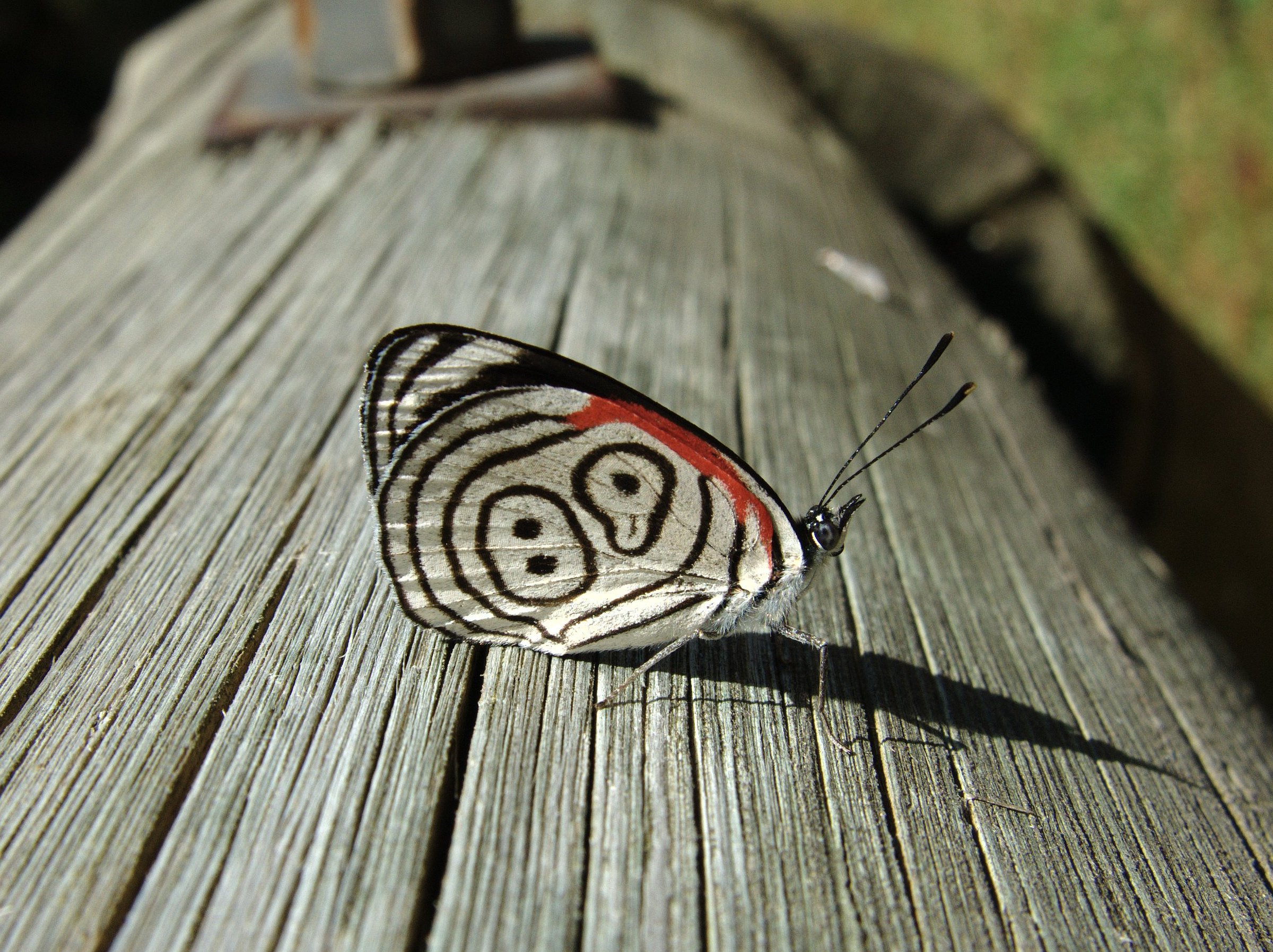 Diaethria eluina (Nymphalidae, Biblidinae), Curitiba, Brasil.